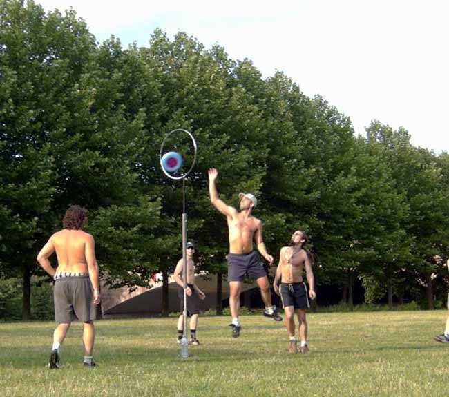 vier Friskeespieler, von denen einer gerade die Frisbeescheibe durch das Tor, die sogenannte Felge, wirft